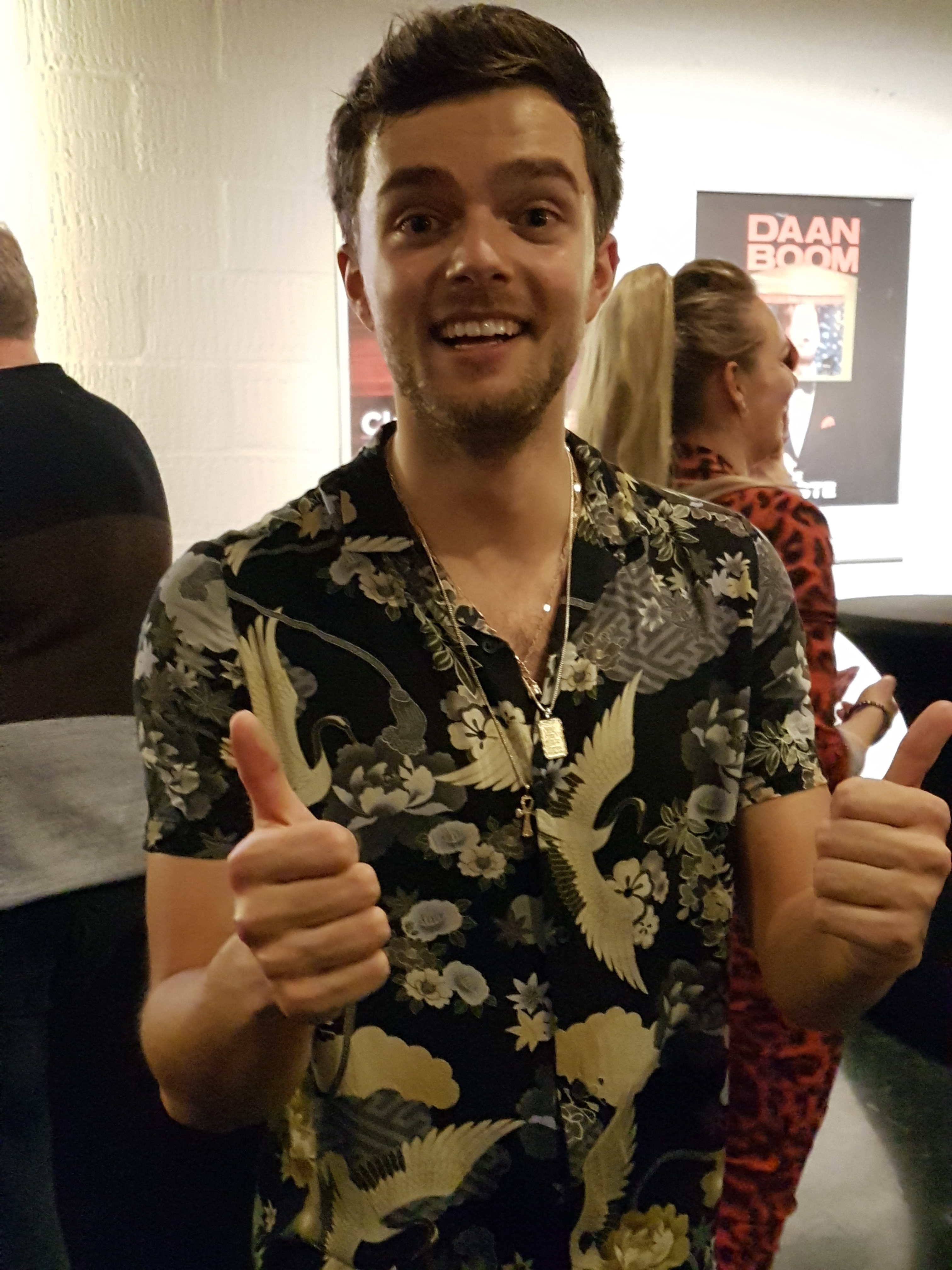 Zanger/danser/acteur Buddy Vedder